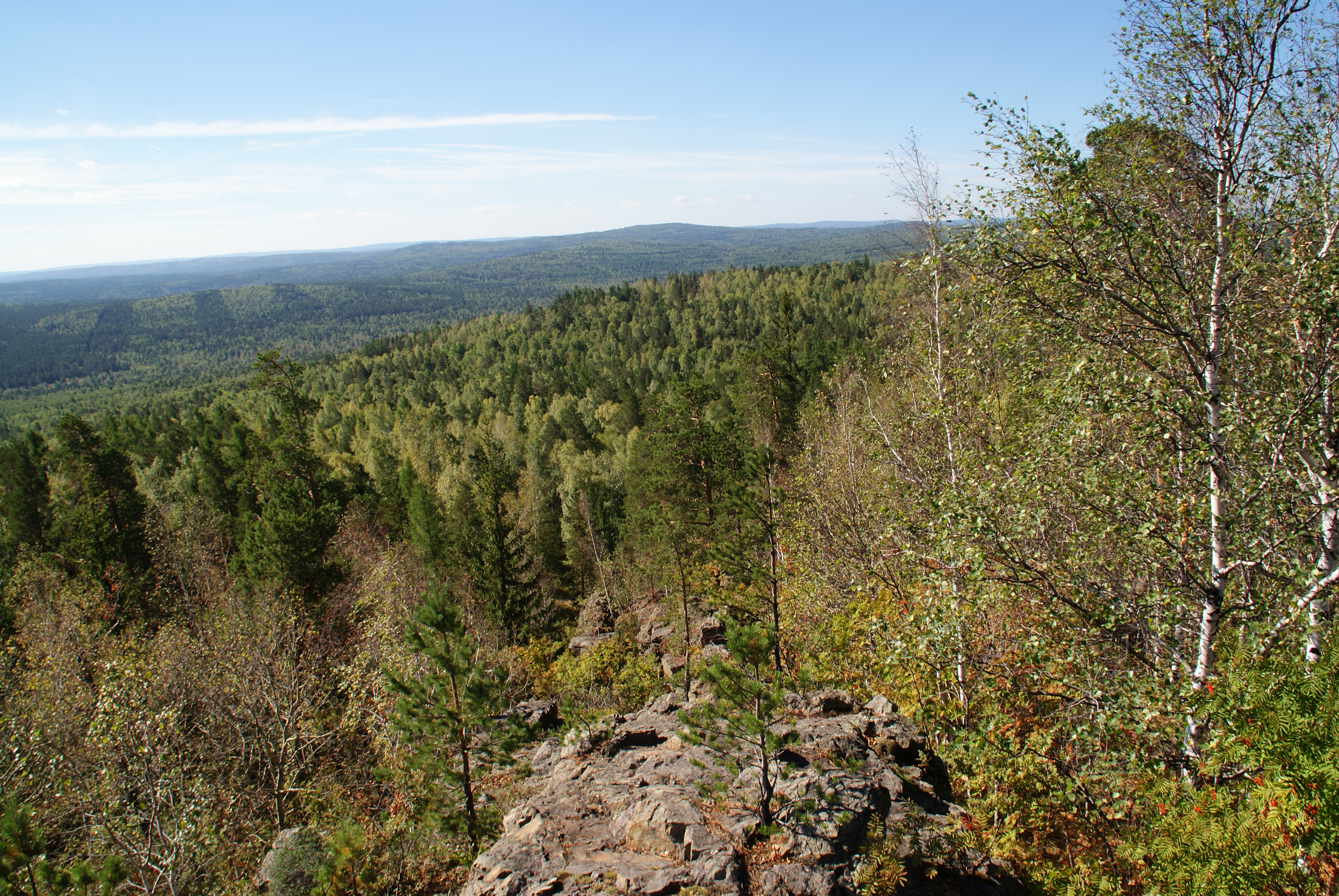 Гора "Азов", Полевской This image is related to the protected area of Russia number 6610536